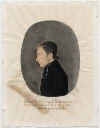 Portrait de Auguste Le Roussel curée de cerisy